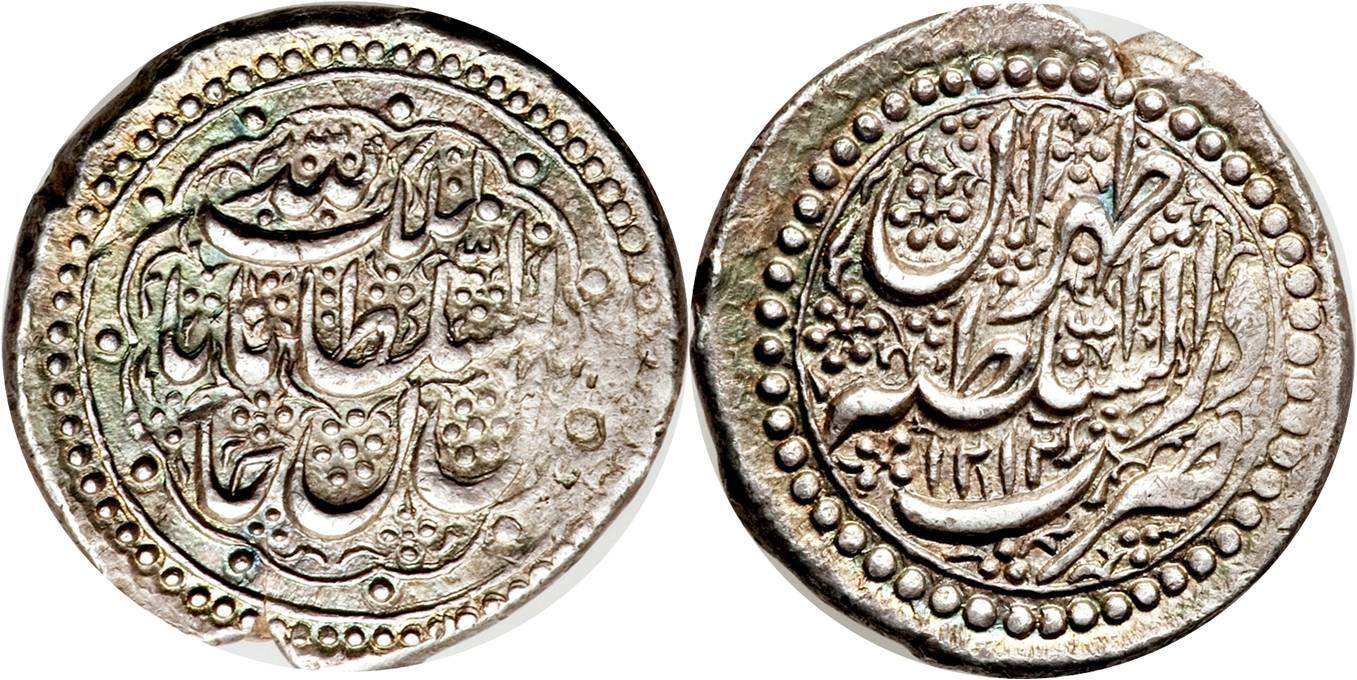 سکه یک ریالی فتحعلی شاه که در نخستین سال حکومتش ضرب شده